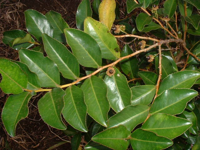 Aphloia theiformis, Change écorce, La Réunion